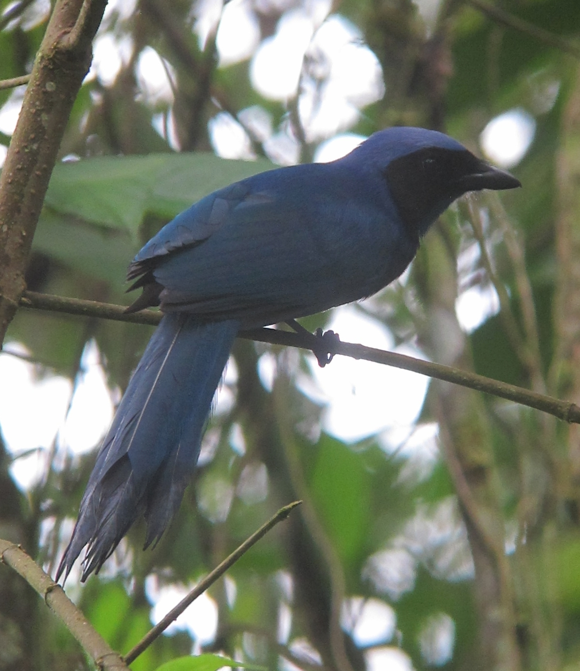 Manizales, Caldas, Colombia